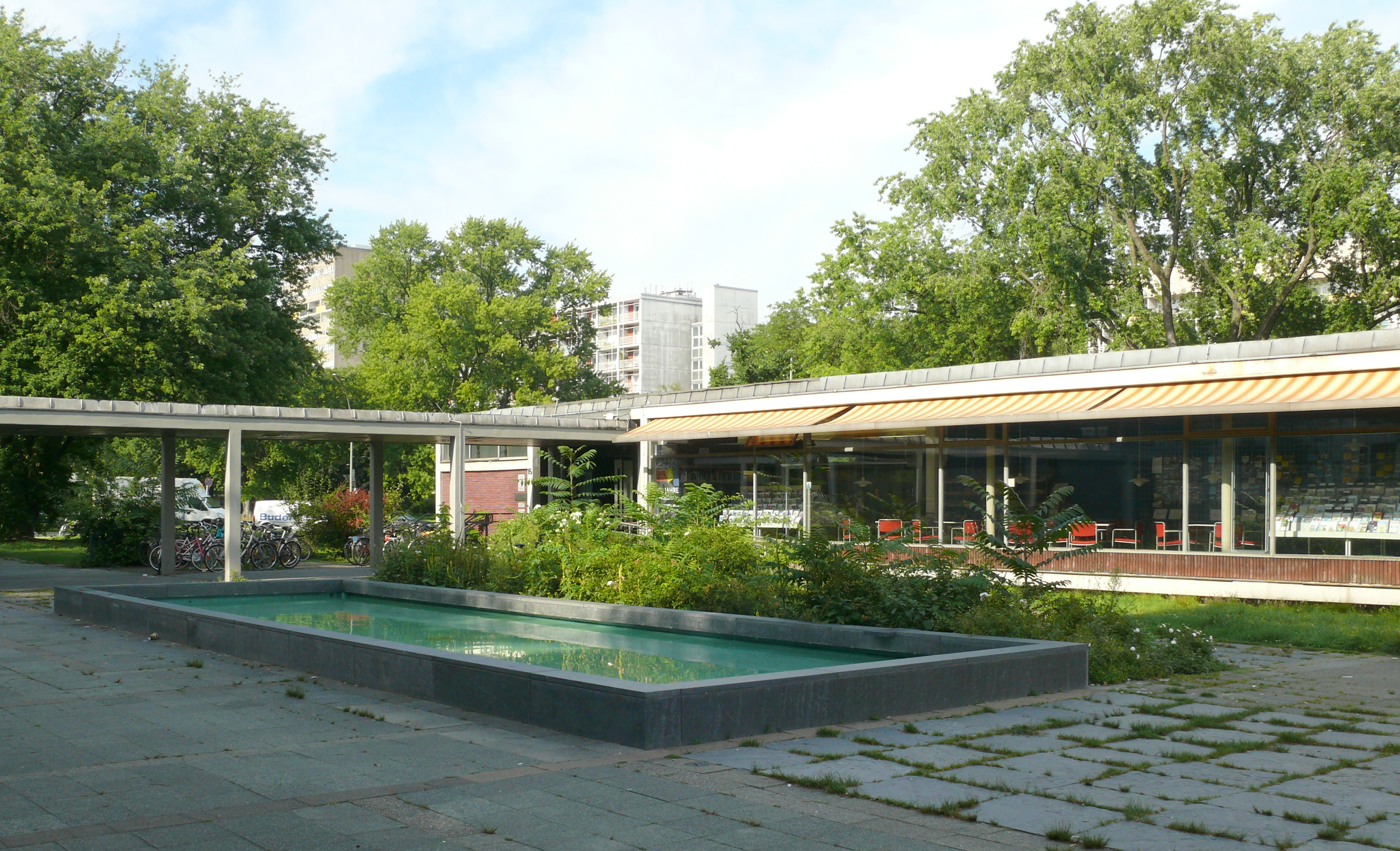 Hansaviertel Hansaplatz Wasserbecken